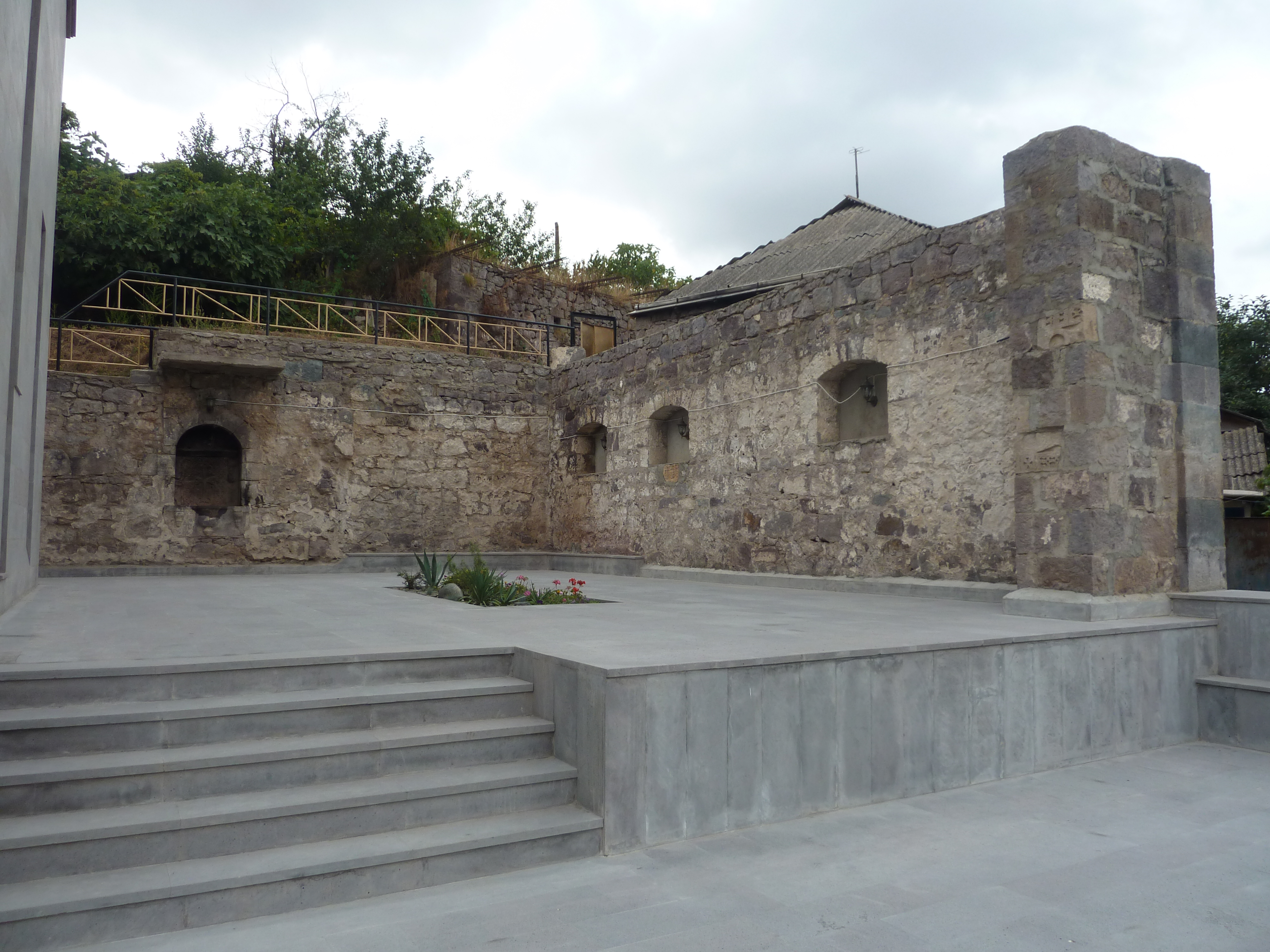 Հայաստանի Հանրապետության Տավուշի մարզի Մովսես գյուղում գտնվող Սուրբ Աստվածածին եկեղեցու արևելյան կողմից գտնվող հին եկեղեցու մնացորդները